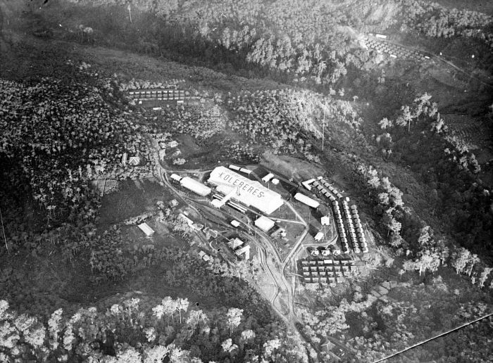 Repronegatief. Theeonderneming 'Koleberes', West-Java